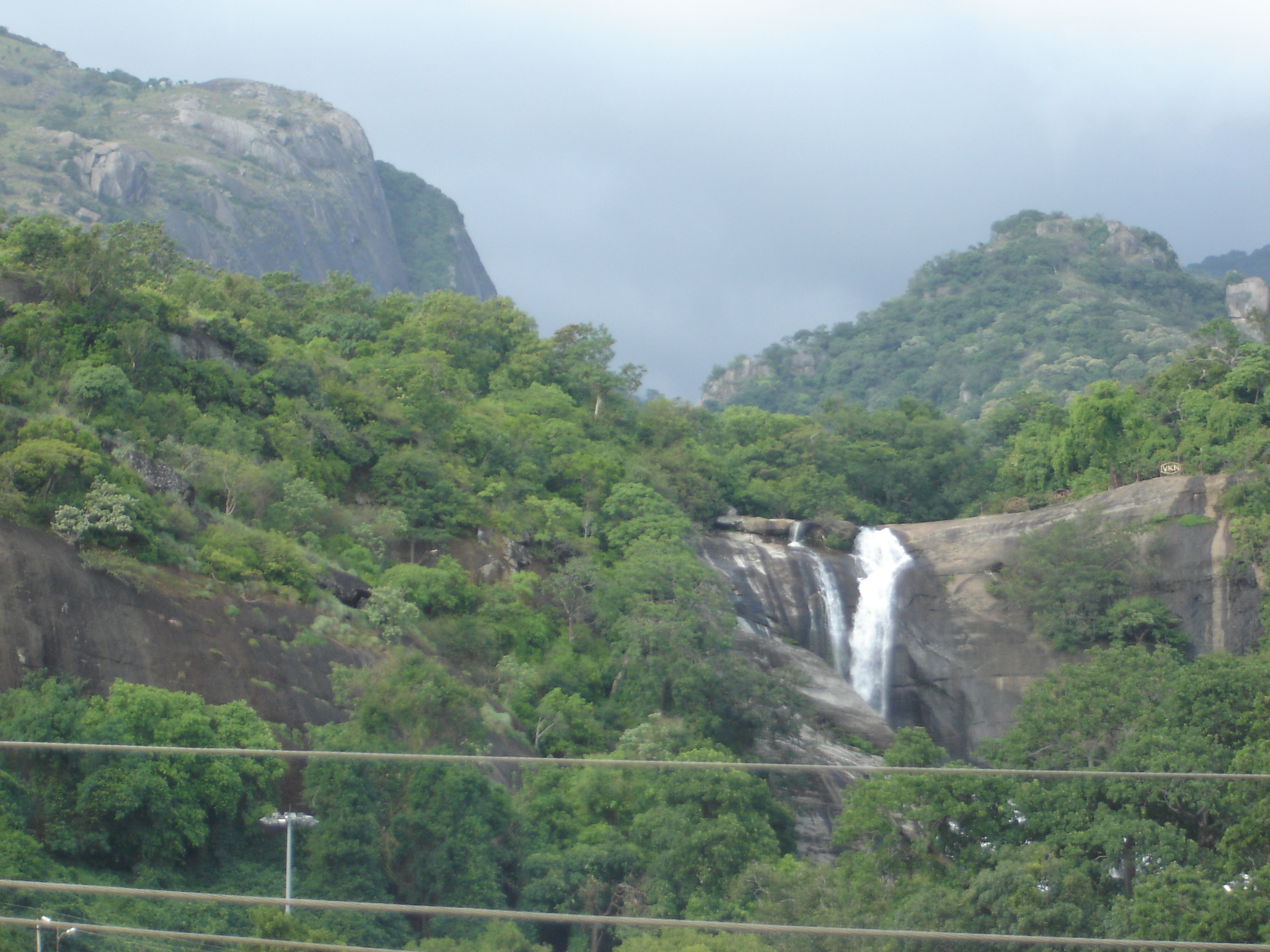 பேரருவி - தலவாய் ஹவுஸ் தங்கும் விடுதியில் இருந்து.